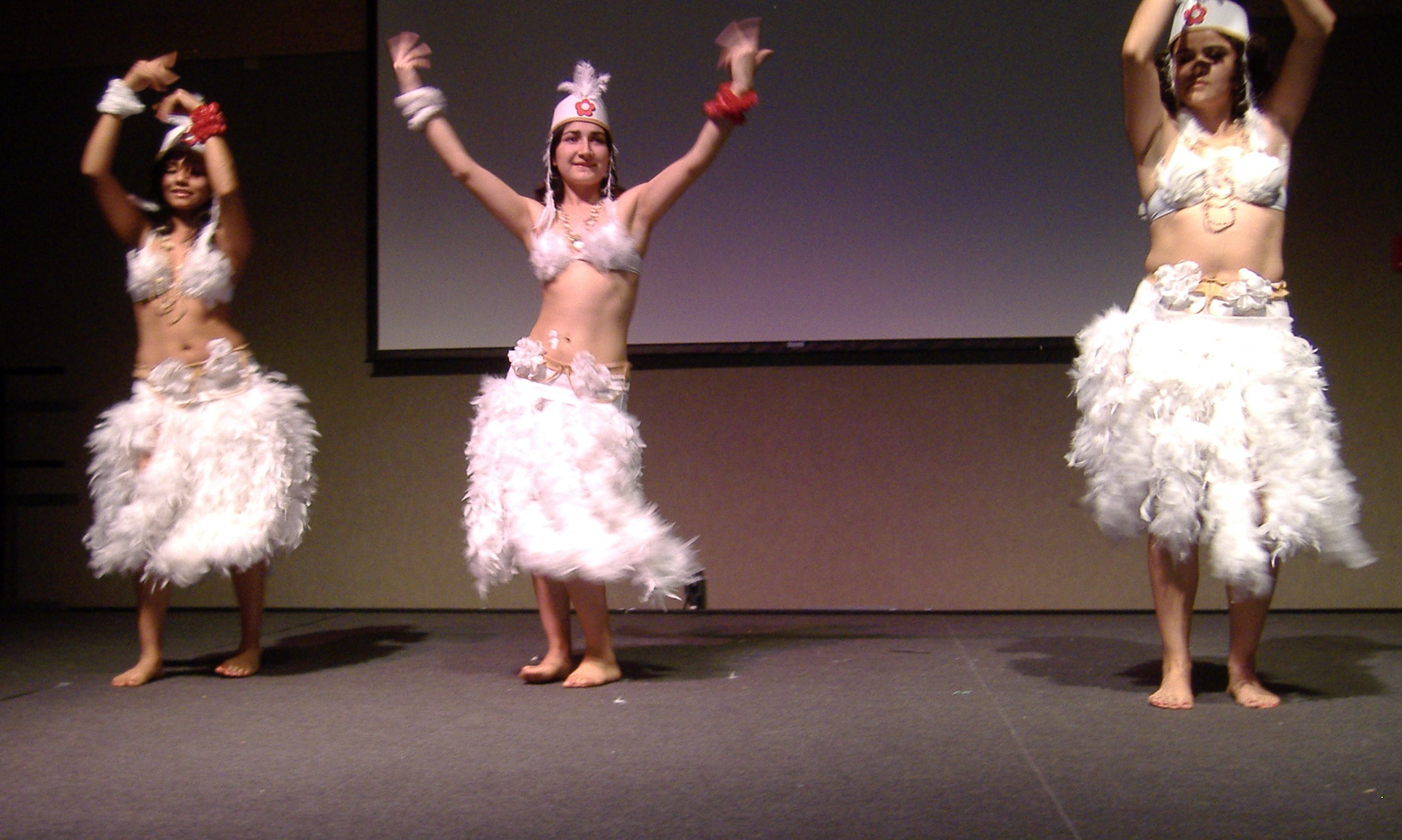 Baile de Isla de Pascua